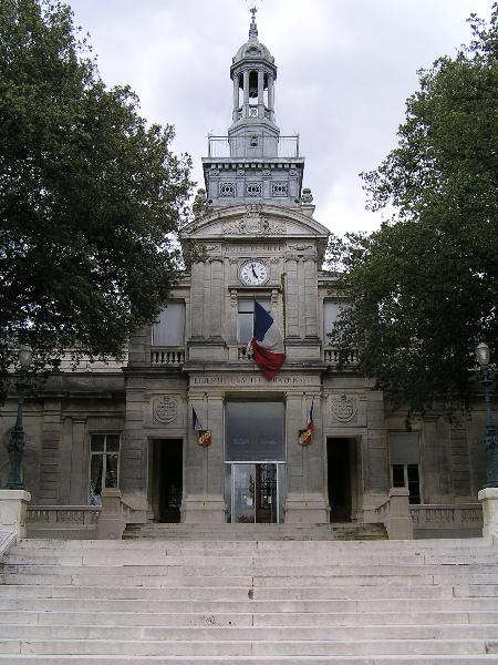 Hôtel de ville de Cognac (16), France